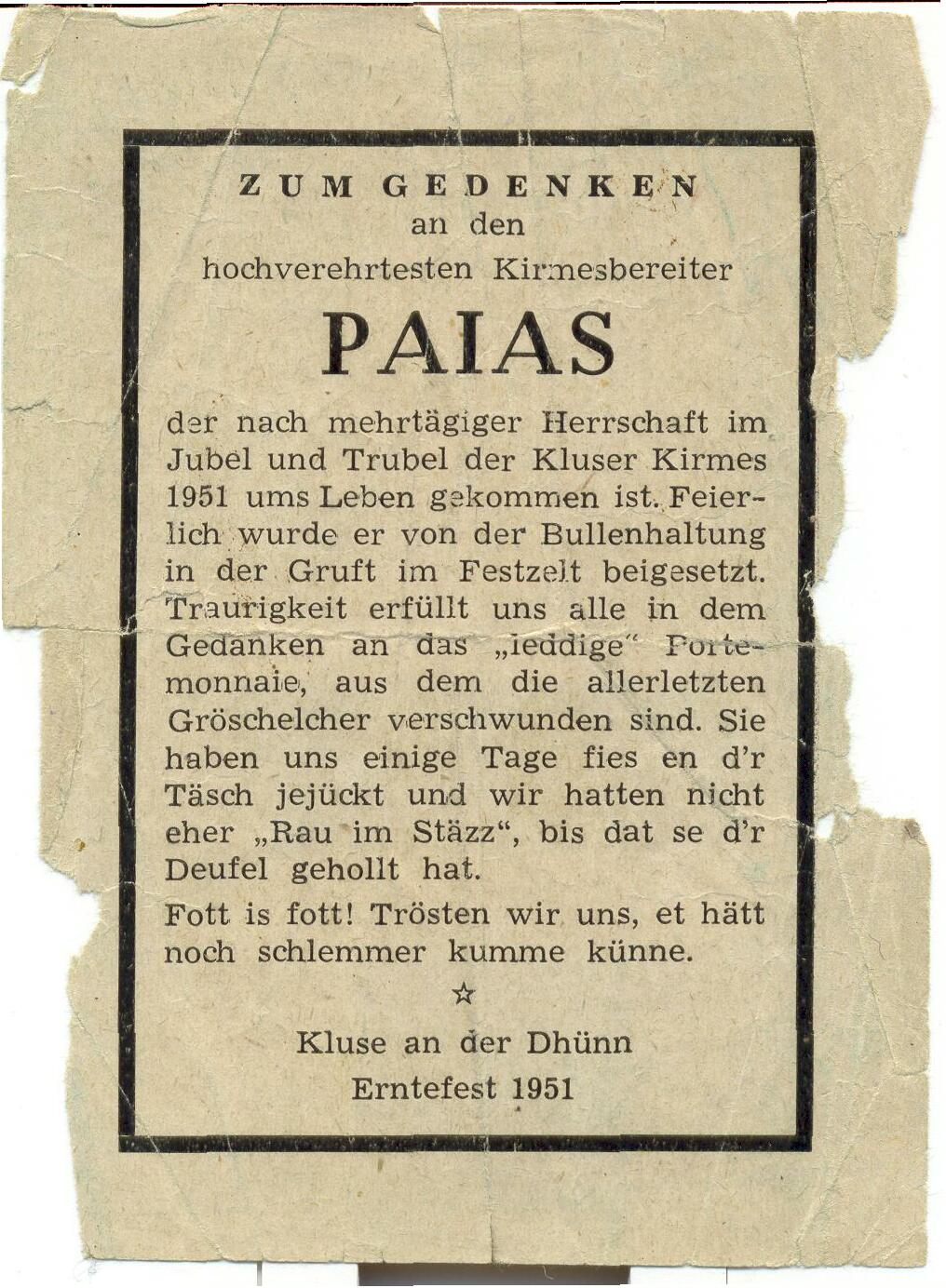 Anzeige